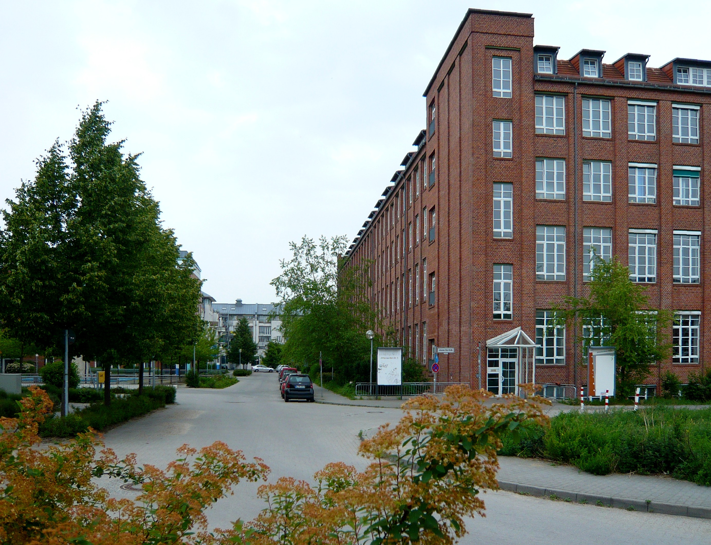 Weißensee, Wilhelm-Wagenfeld-Str.